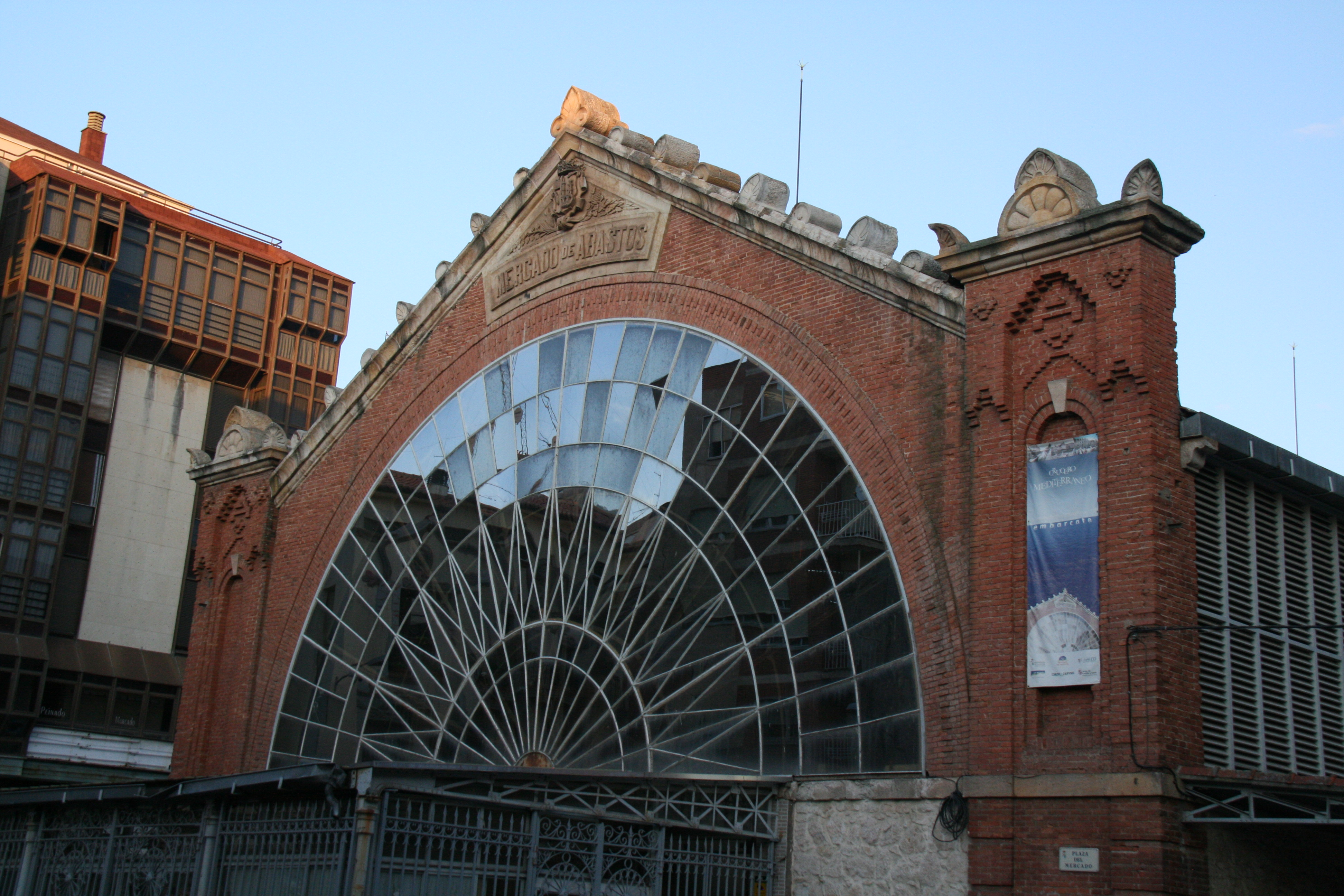 Mercado de Abastos de Zamora